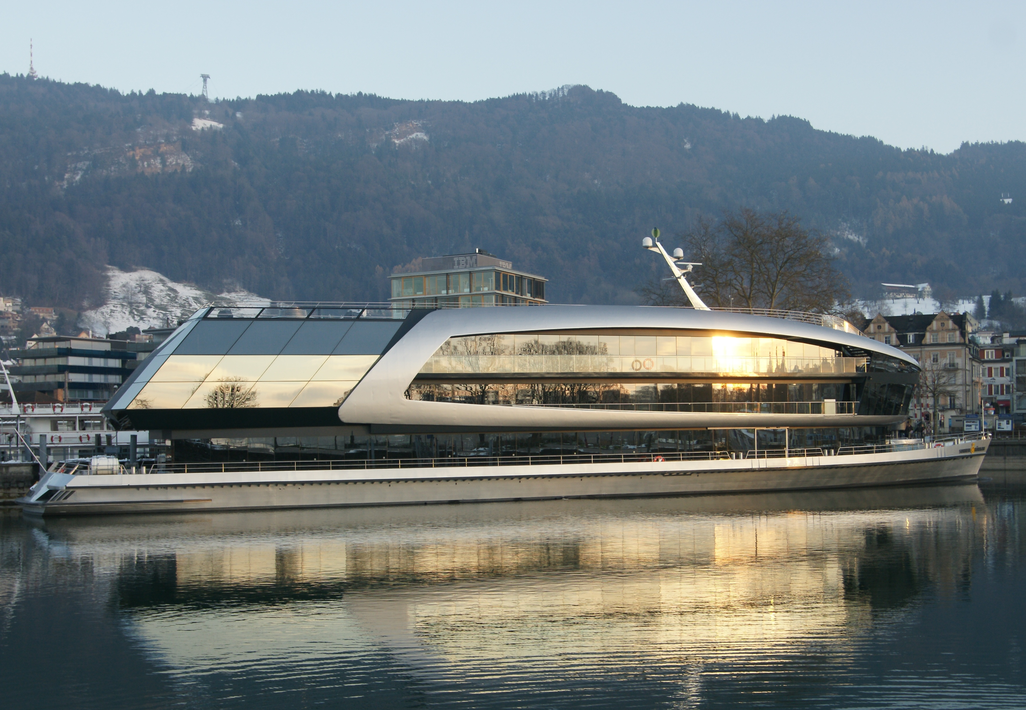 Das Motorschiff Sonnenkönigin ist ein Passagierschiff auf dem Bodensee mit dem Heimathafen Bregenz. Eigner ist der Vorarlberger Touristik-Unternehmer Walter Klaus. Hersteller ist die Bodan-Werft Metallbau GmbH in Kressbronn am Bodensee.